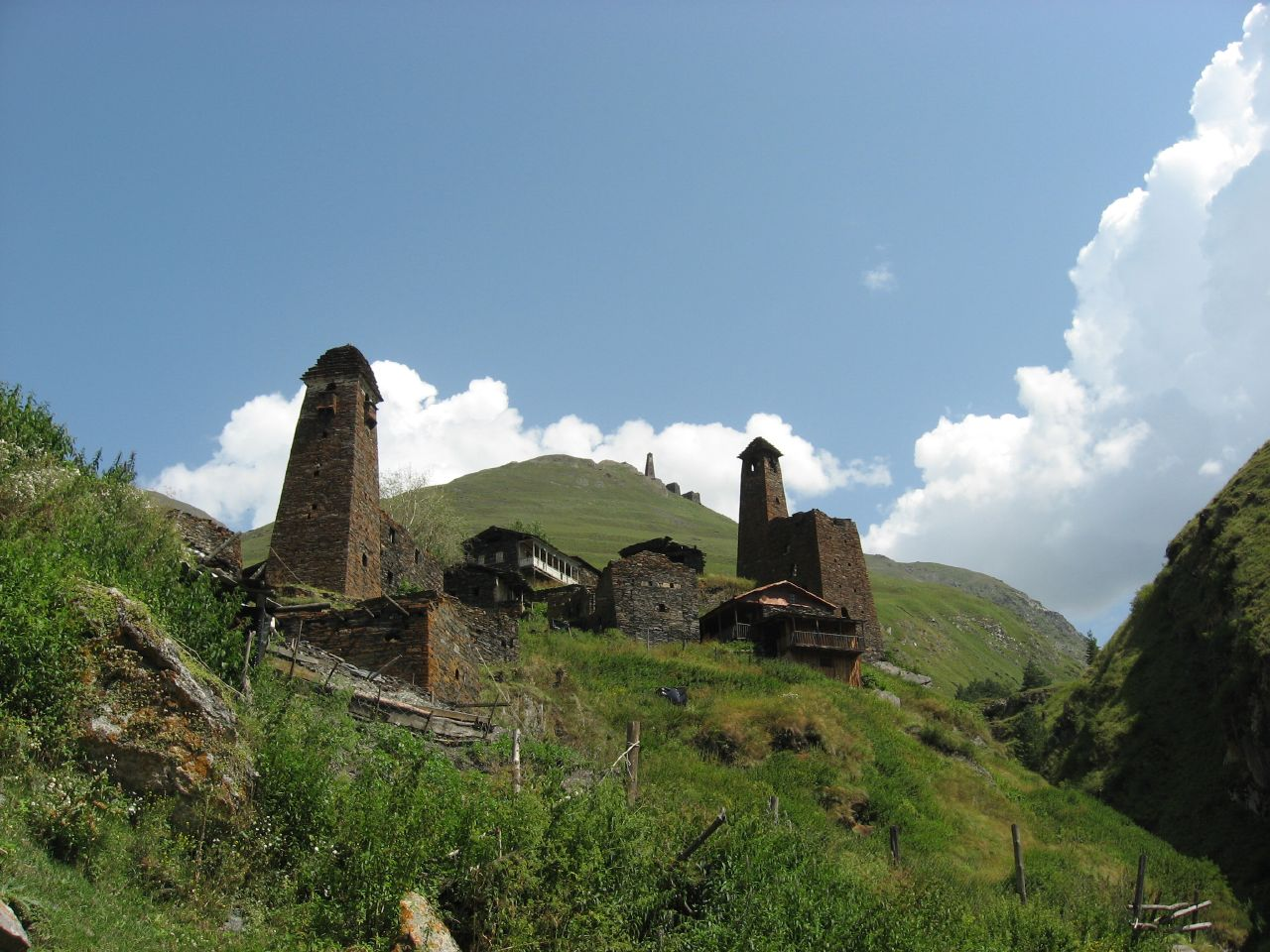 Dartlo (დართლო), Tusheti Georgia